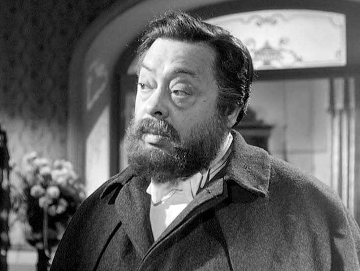 Screenshot del film Questa è la vita, registi vari, 1954